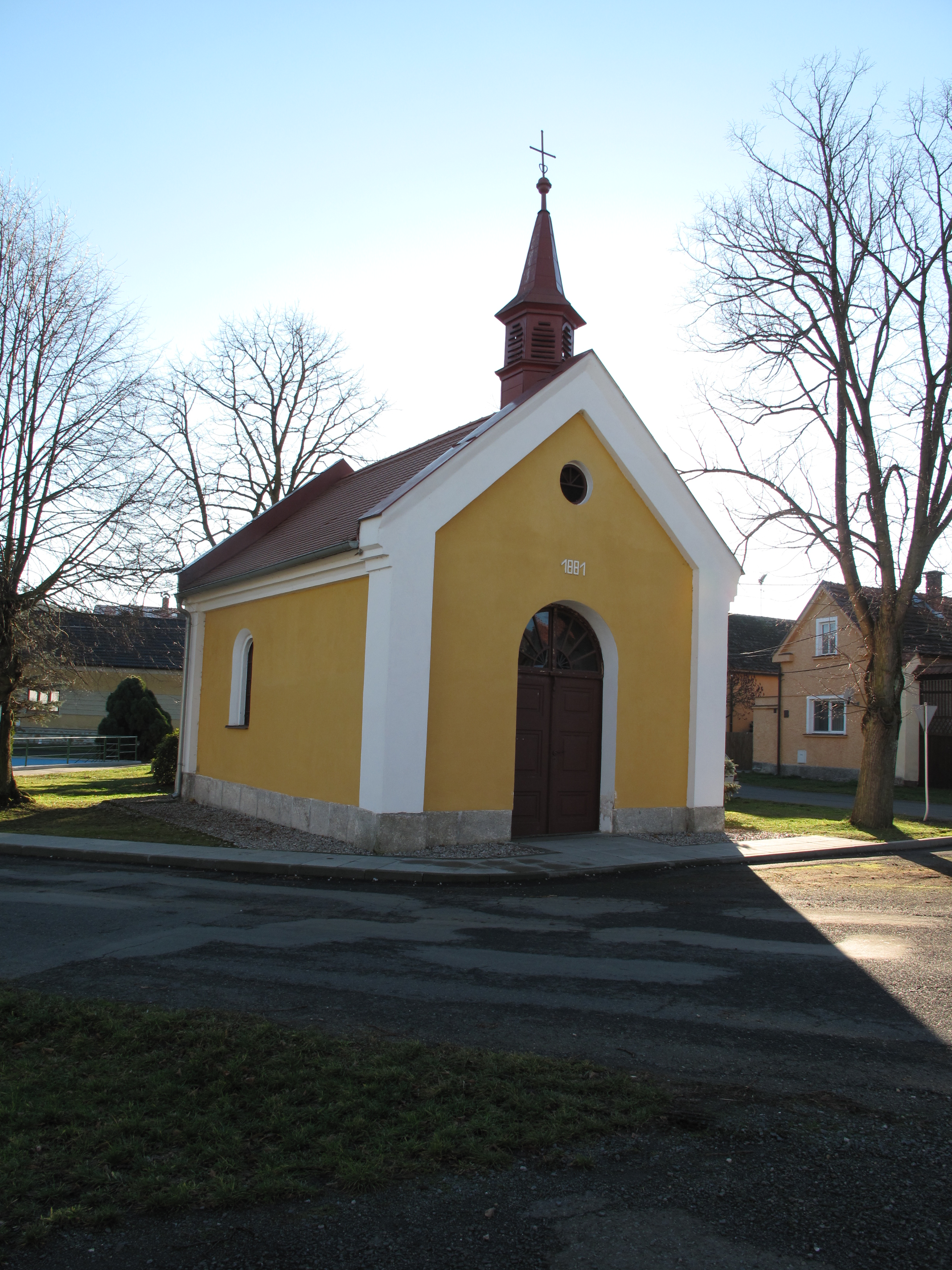 Kaplička v Těšovicích. Okres Domažlice, Česká republika.